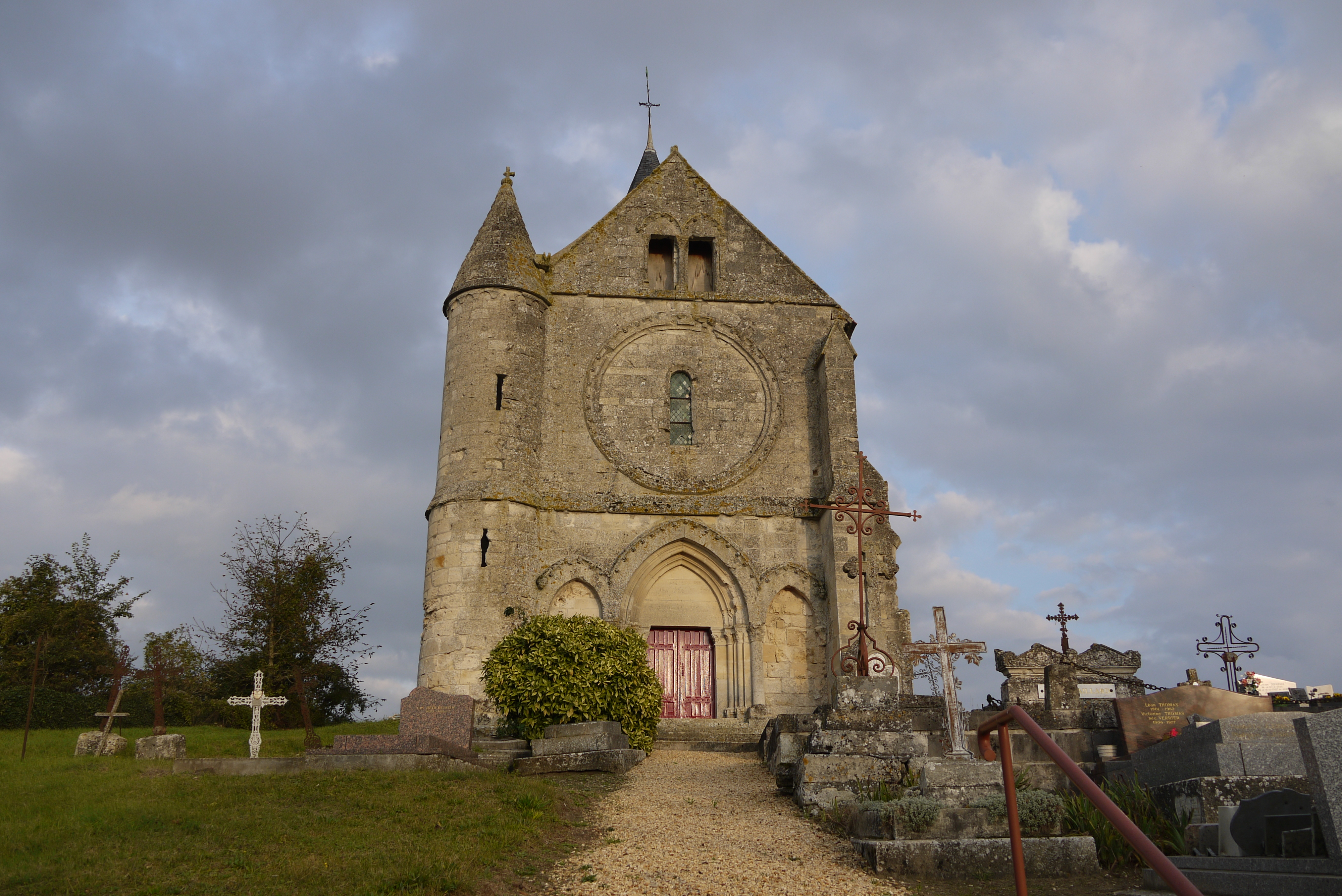 Église Saint-Martin de Marizy-Saint-Mard